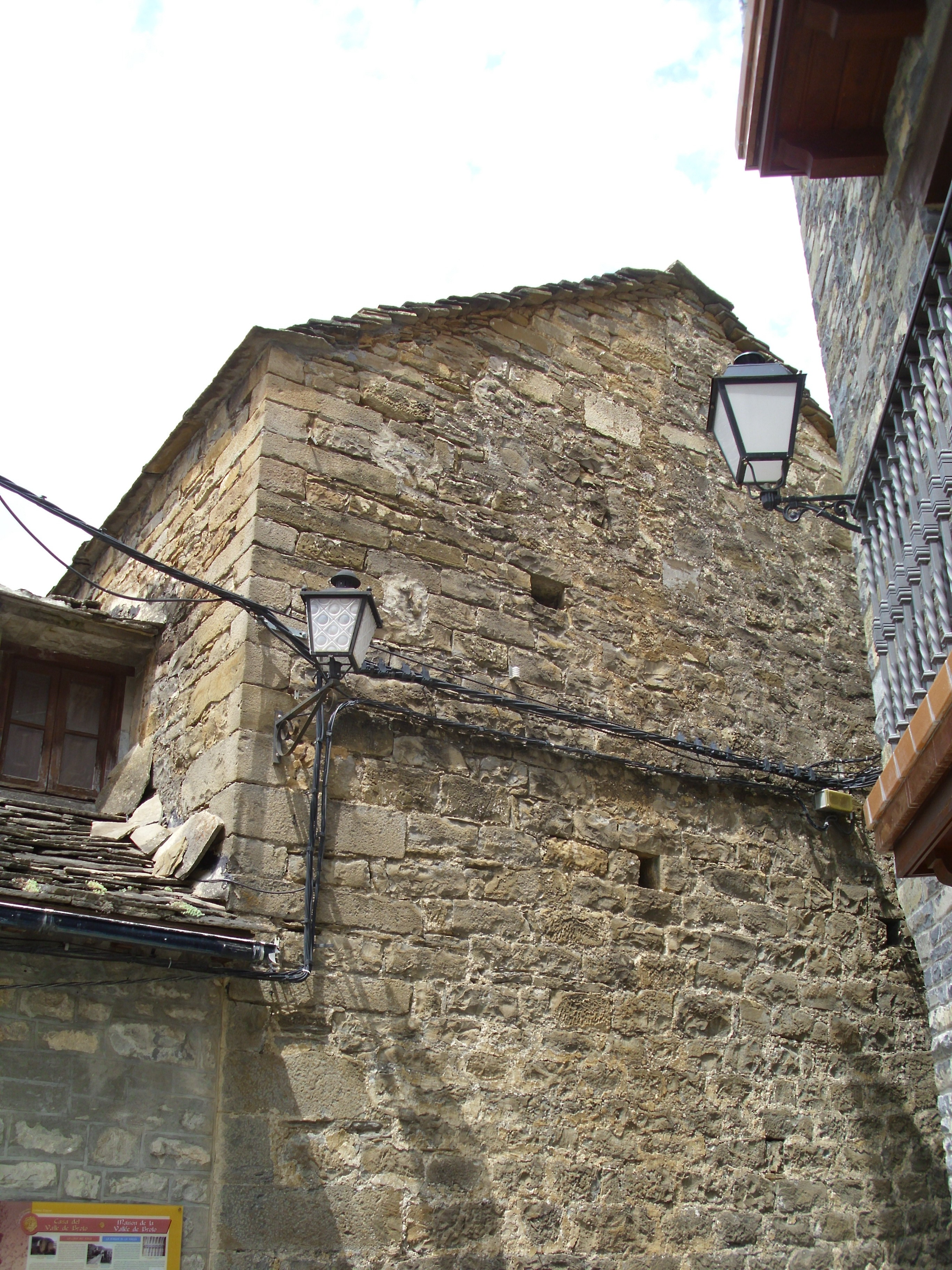 Torre de la cárcel de Broto.